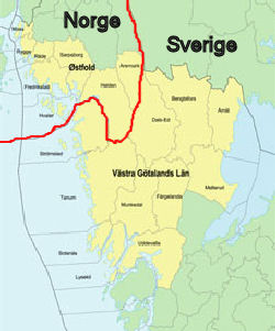 Samarbetsregionen i Boshulän-Dalsland och Östfold i Norge. Bilden är gjord av mig. (fd. Lunnen/Lunnen2009 - nu mera Mrkommun)